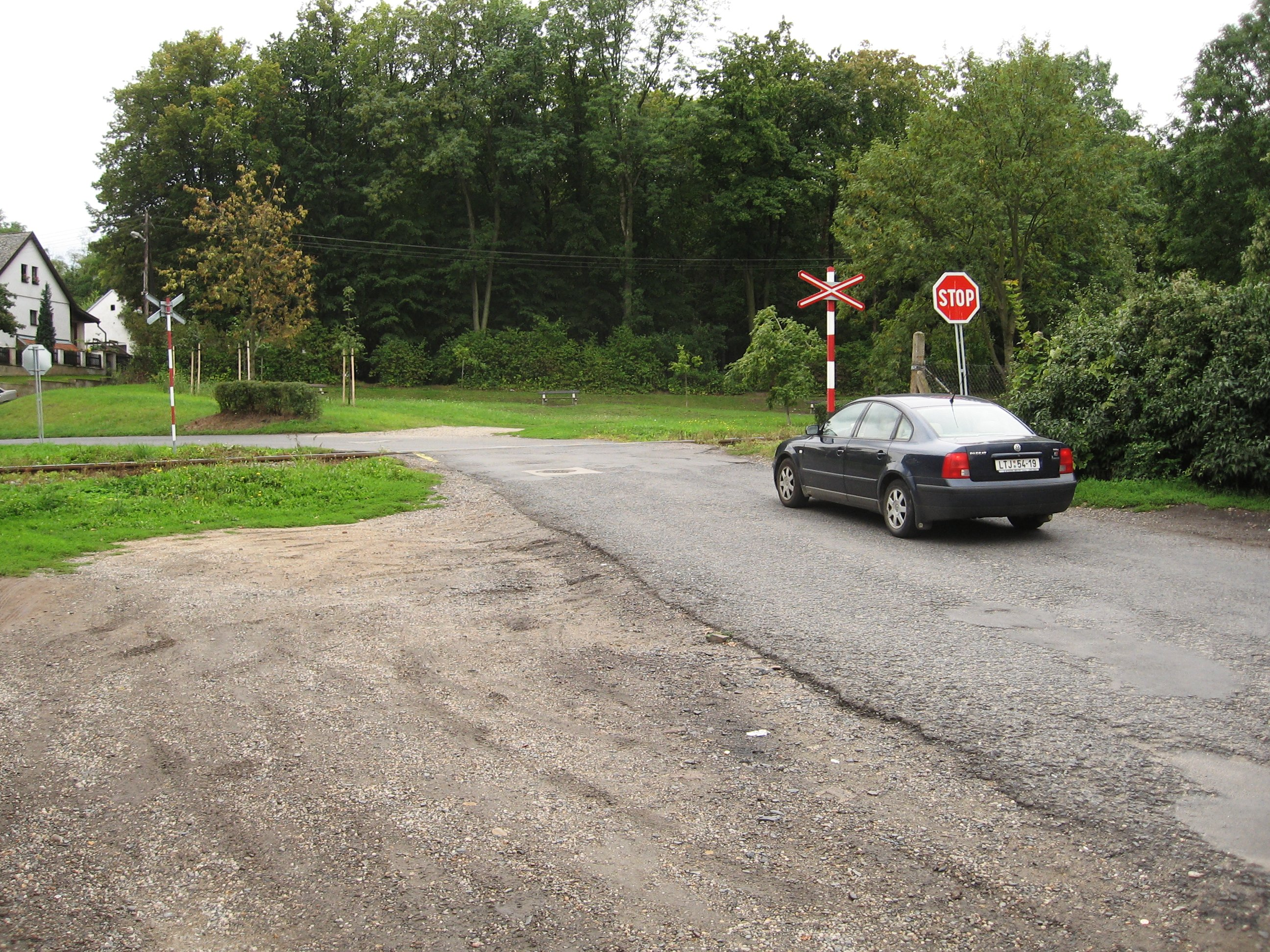 Nechráněný železniční přejezd v Roudnici nad Labem